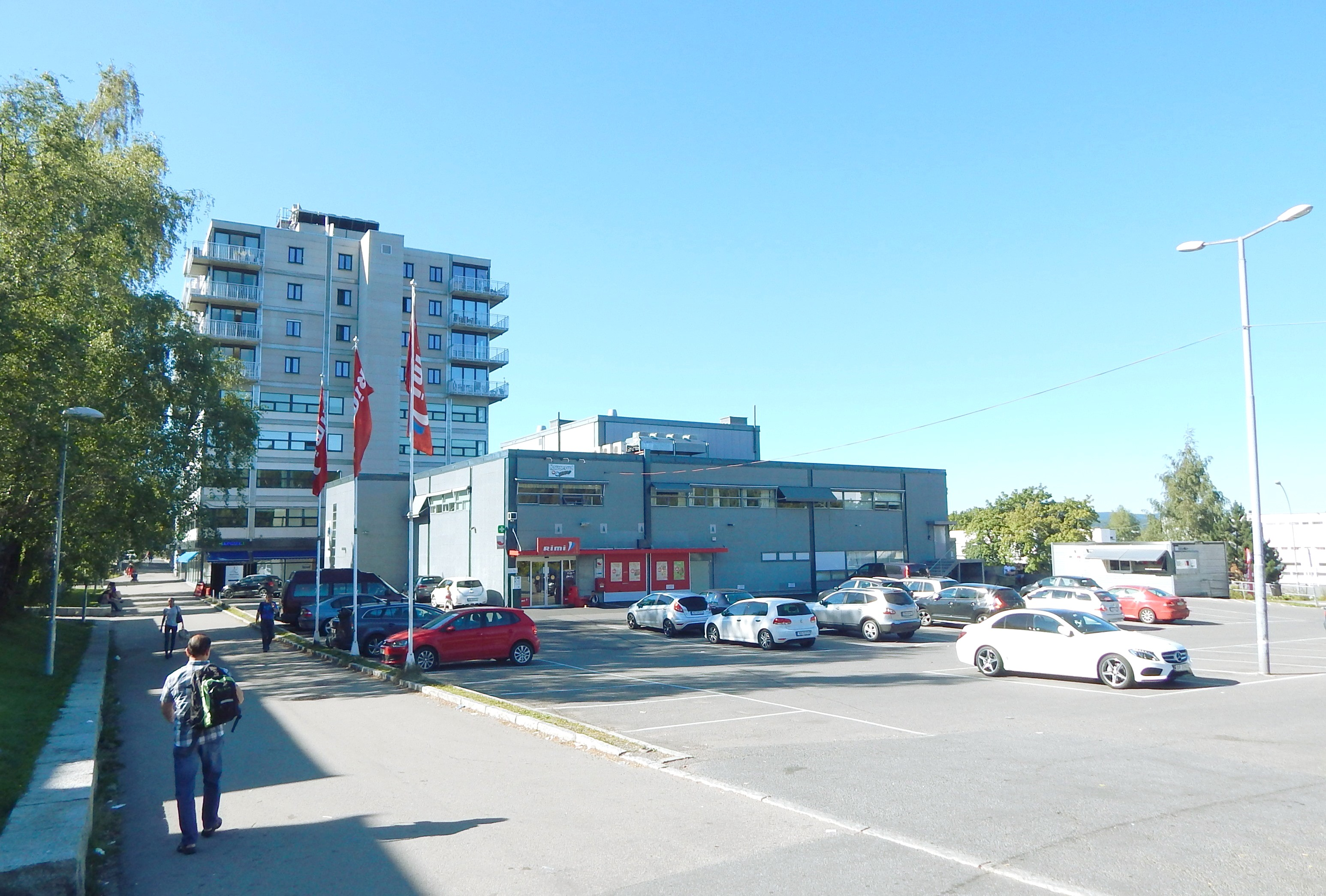 Haugerud senter. Veien Haugerudsenteret ender i parkeringsplassen på sørøstsiden av senteret.